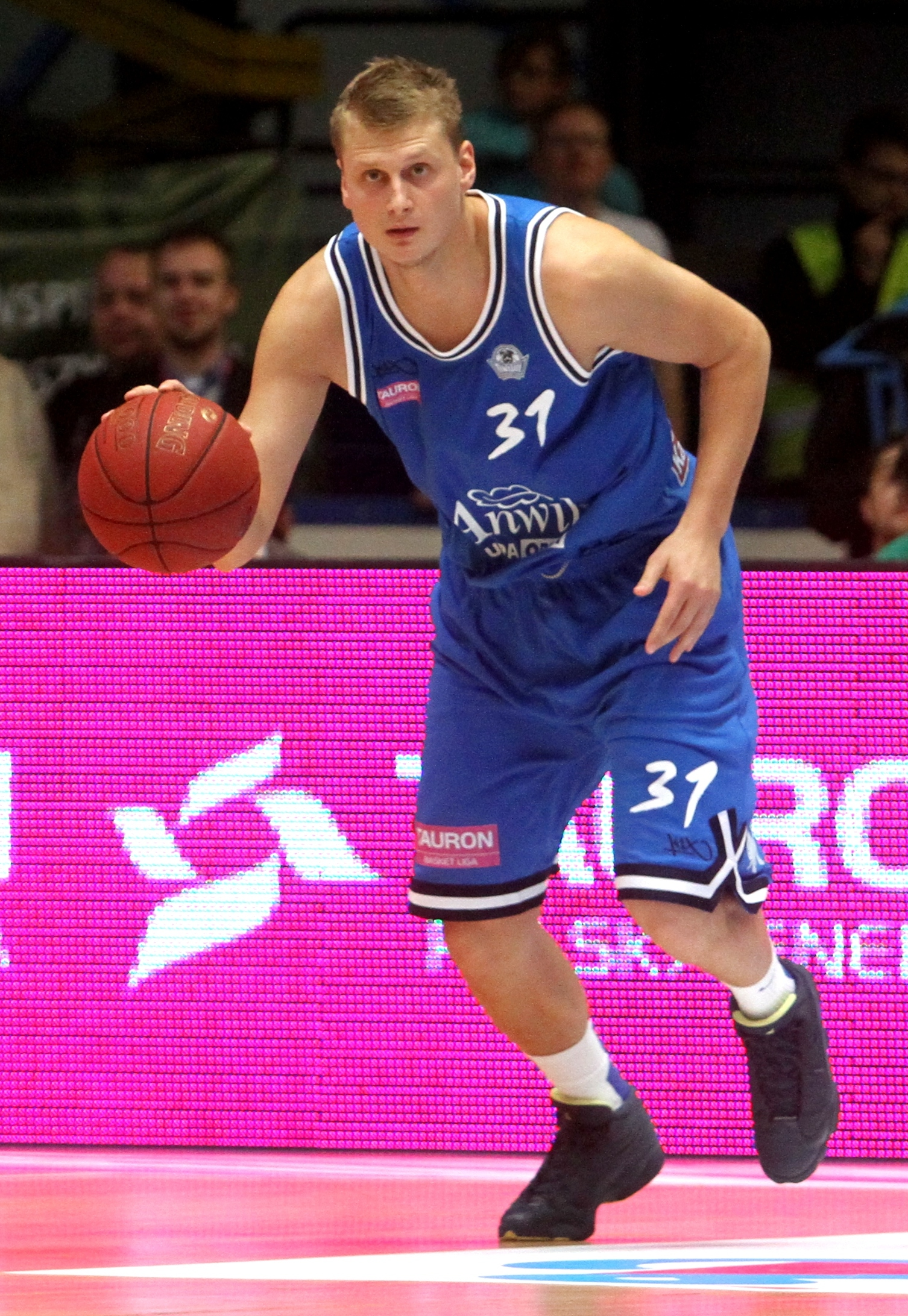 Mateusz Kostrzewski, Anwil Włocławek